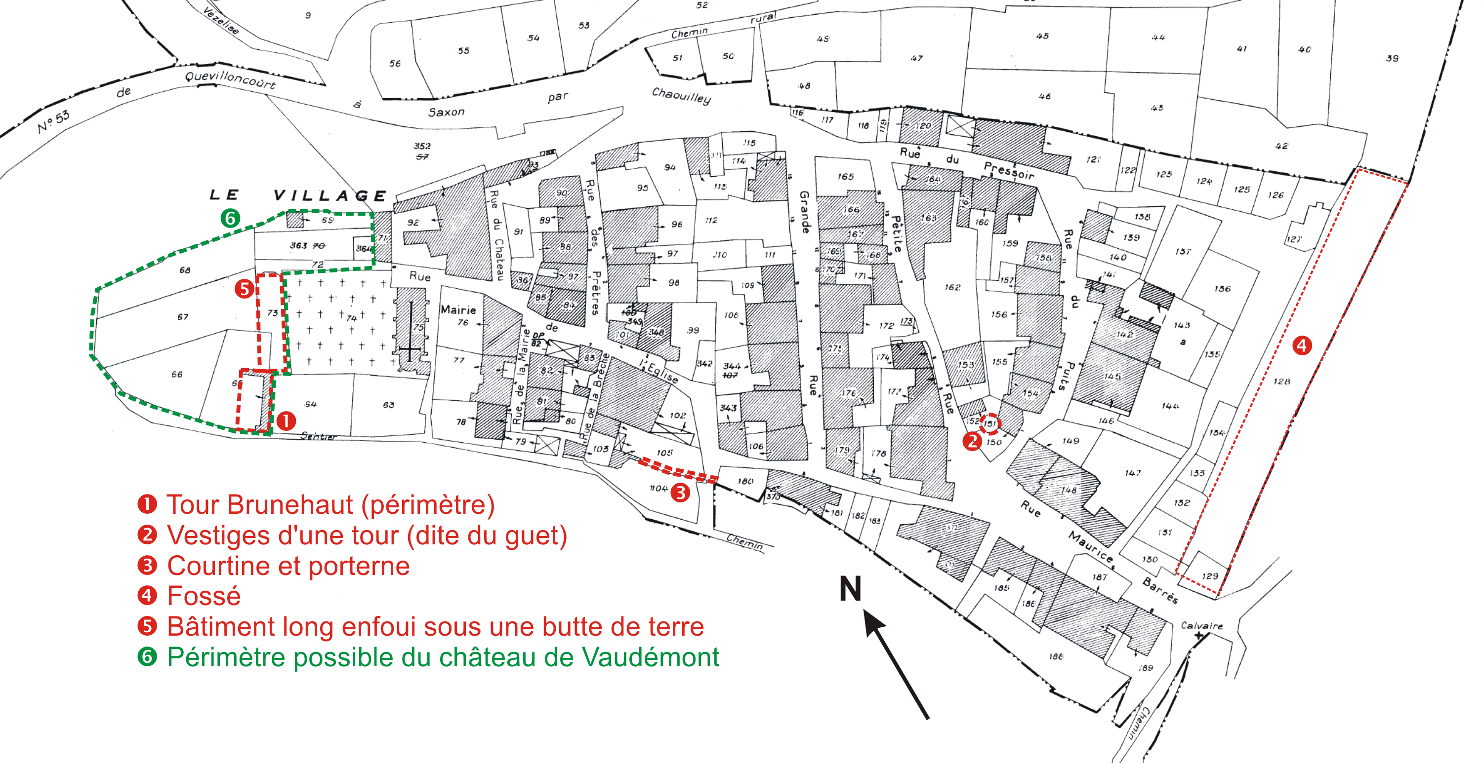 Vestiges de Vaudémont portés sur le cadastre